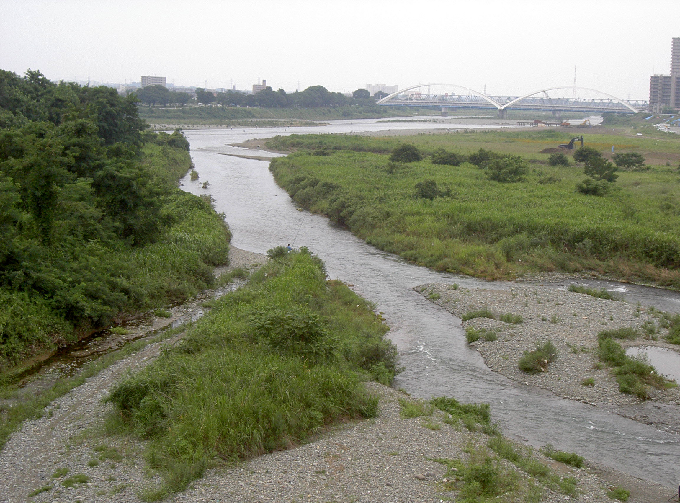 Nakatsu river flowing into Sagami river, Atsugi-city, Kanagawa, Japan. ja: 中津川と相模川の合流地点